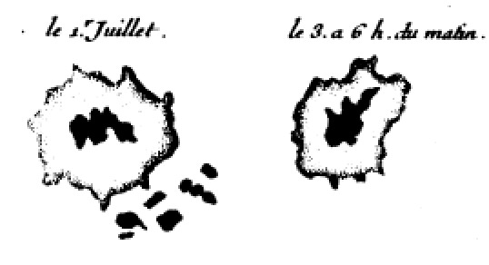 Picard : dessins de taches solaires, 1680.